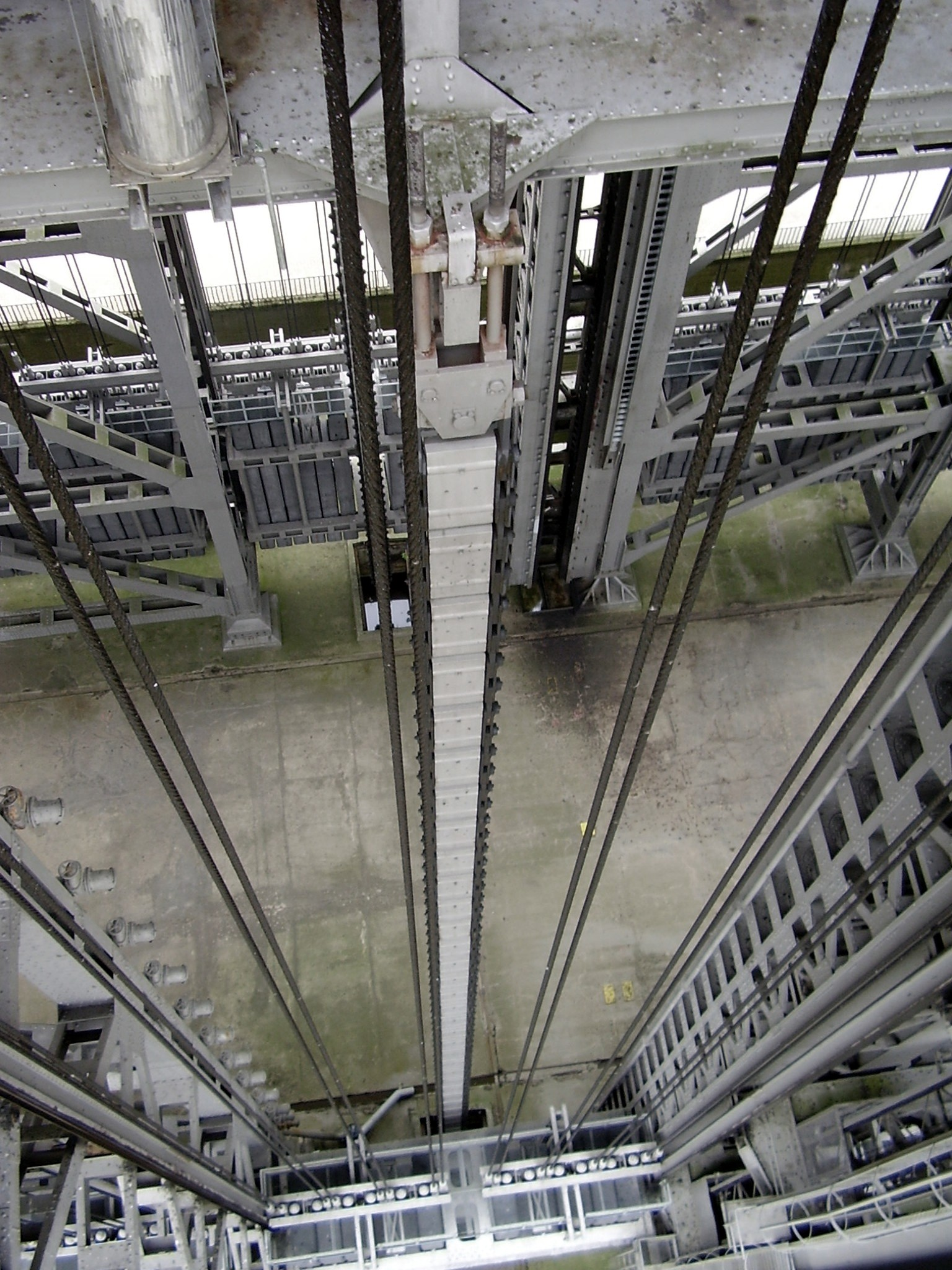 Seilgewichtsausgleichskette am Schiffshebewerk Niederfinow.